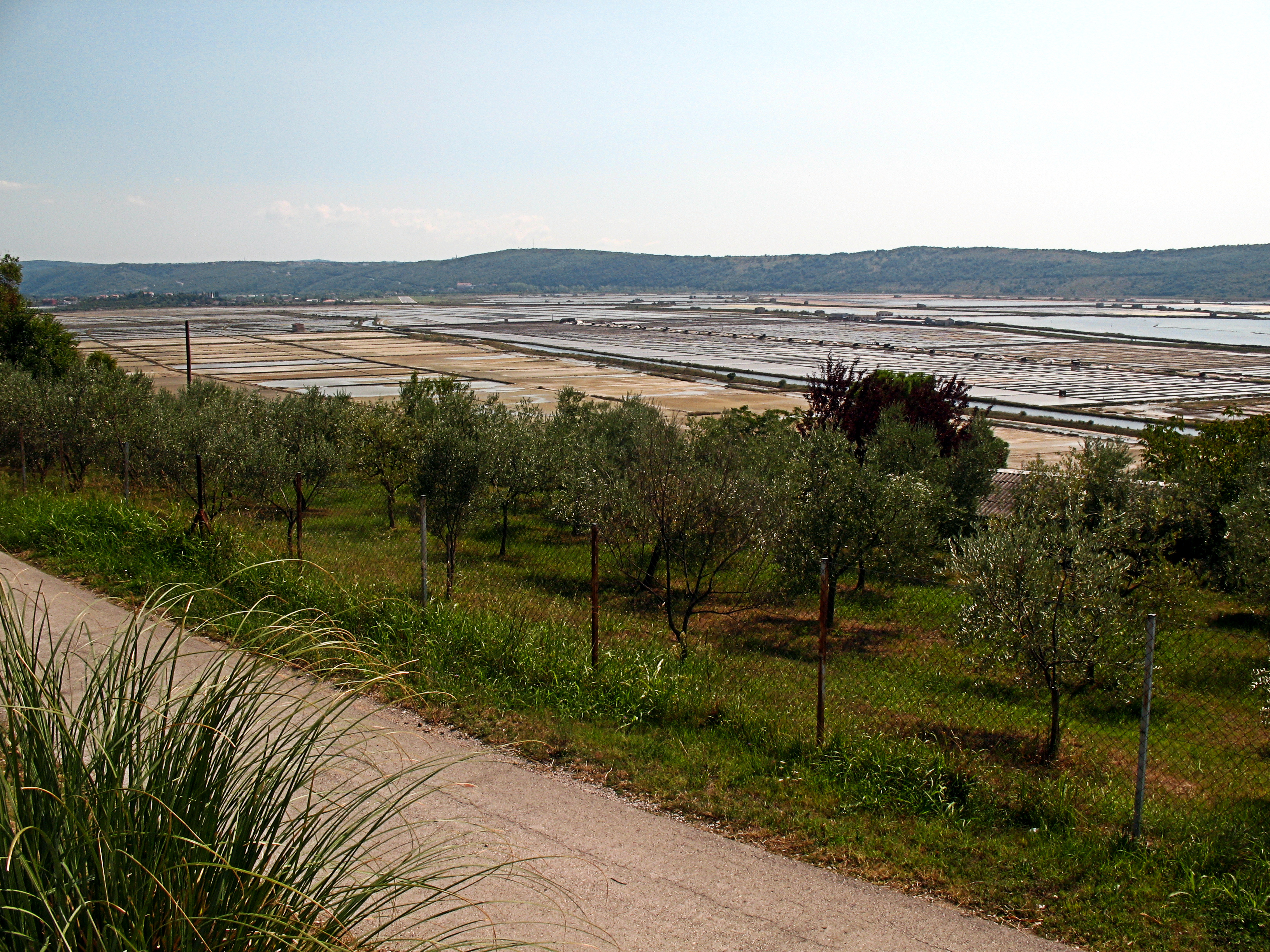 Slowenien, Portorose, Salinen von Sečovlje (gesehen von Piran-Seča)